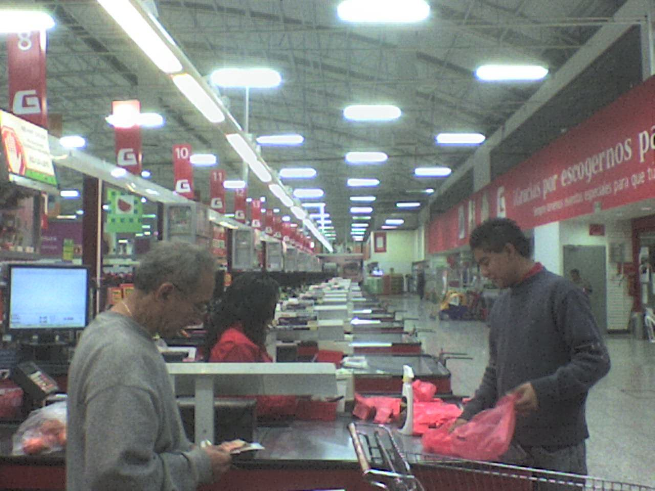 Una tienda de los extintos Supermercados Gigante.